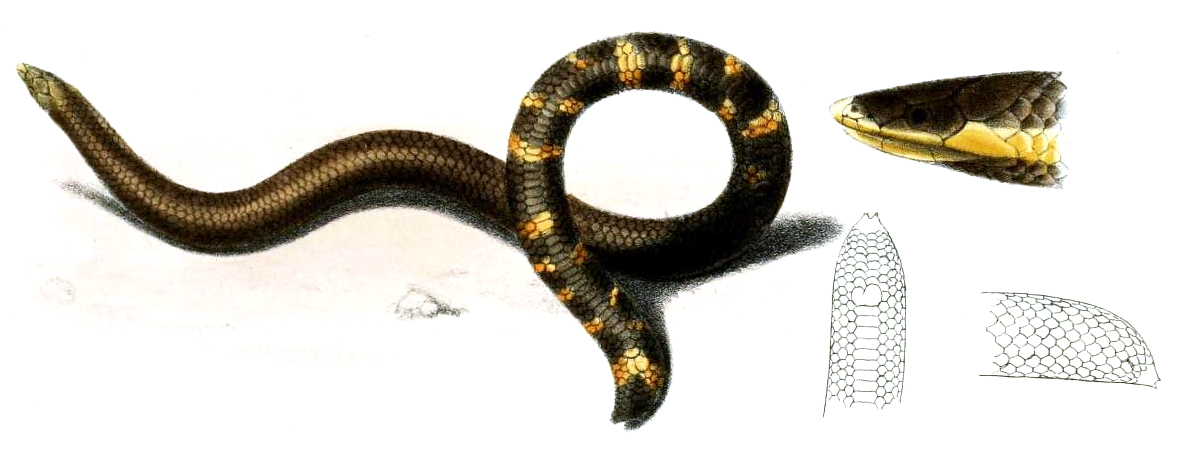 Plectrurus pulneyensis = Uropeltis pulneyensis